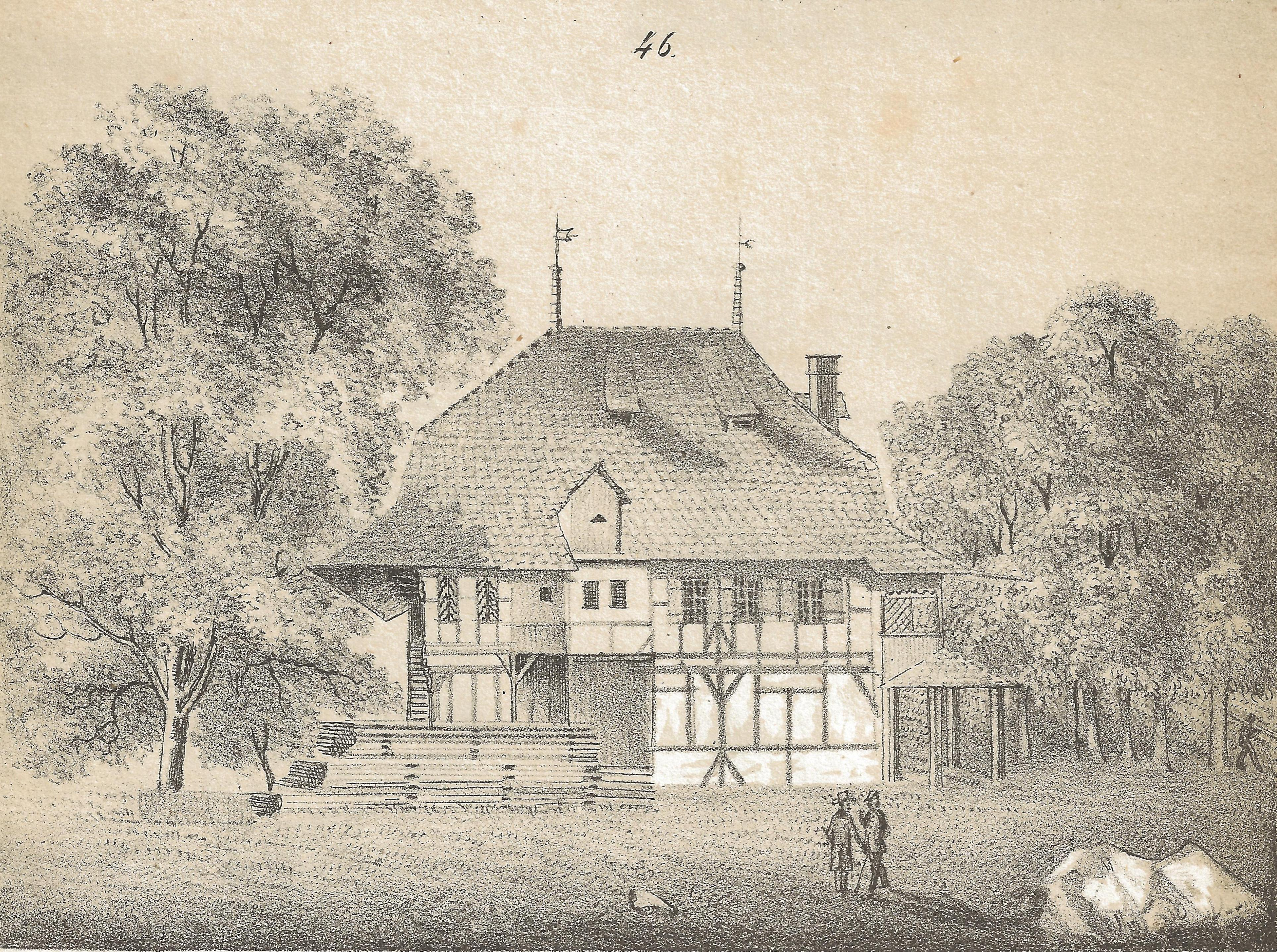 Arnold, Streit, das alte Schützenhaus in Bern (abgebrochen 1862).